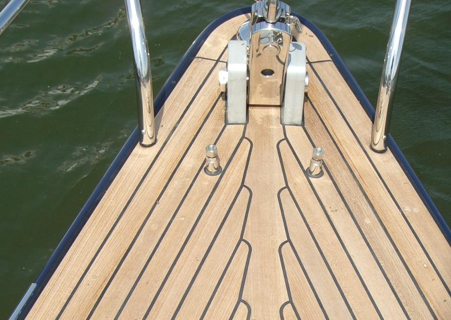 Stabdeck mit Fischung